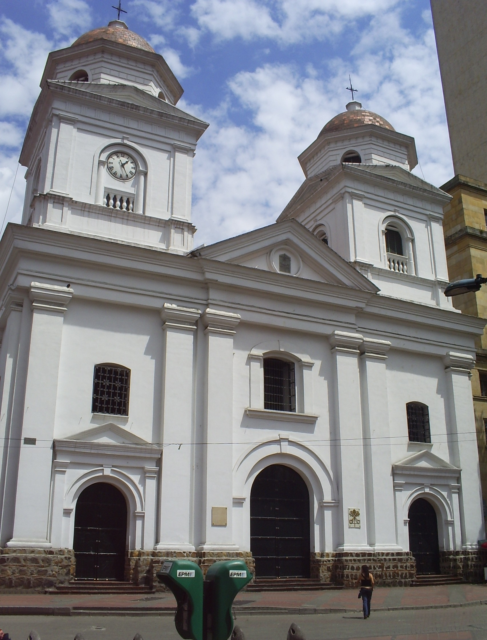 Basílica Menor de Nuestra Señora de la Candelaria, Medellín, Colombia.